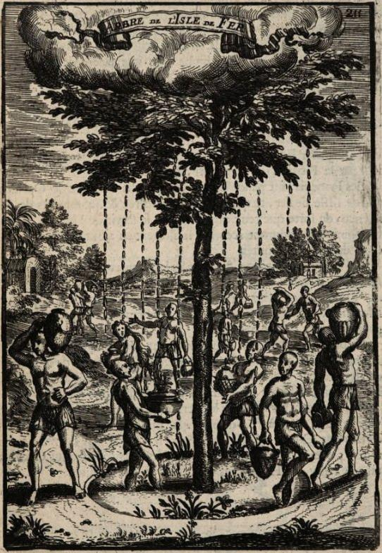 "Arbre de l'Isle de Fer".